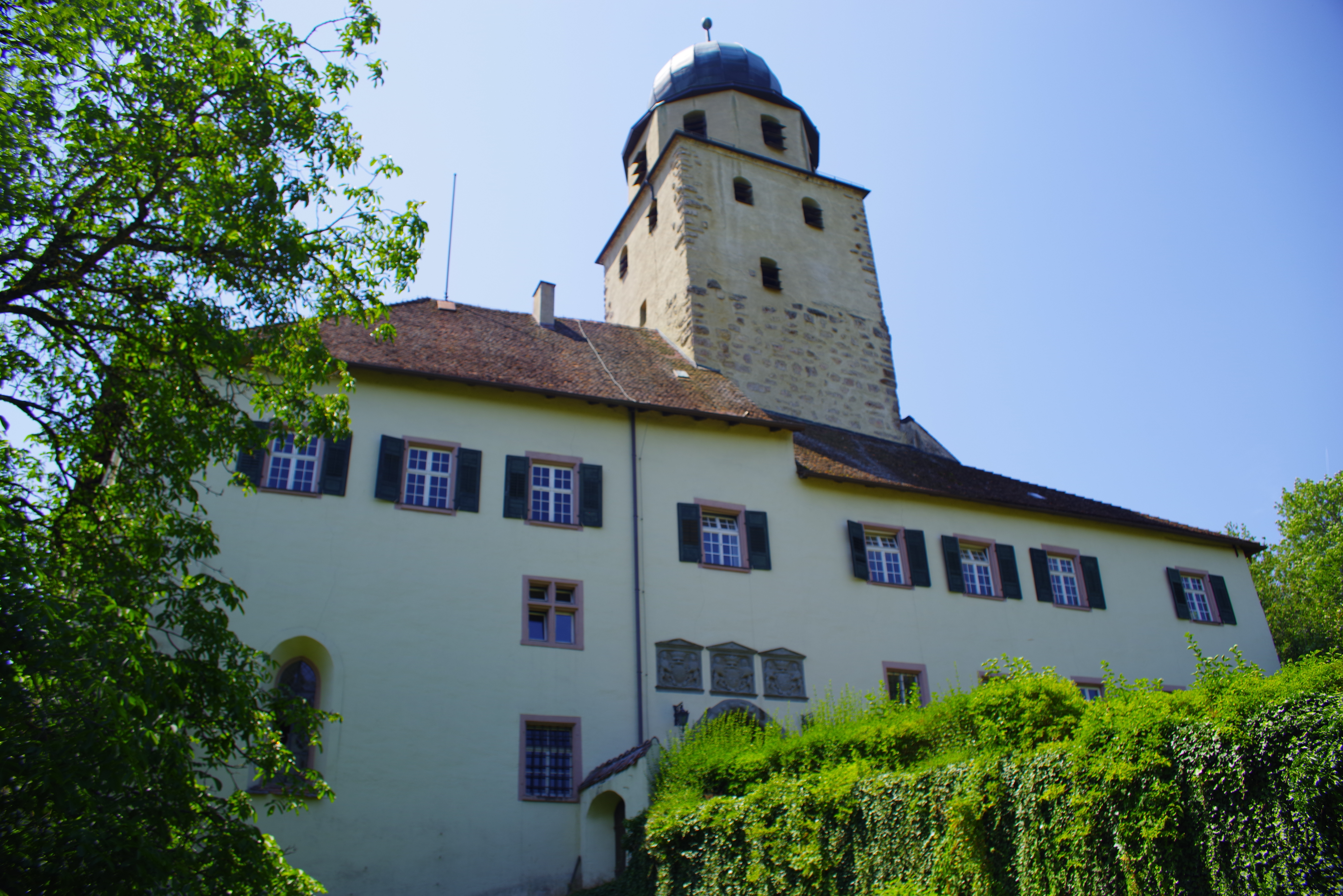 Schloss Hohenlupfen, Ostseite